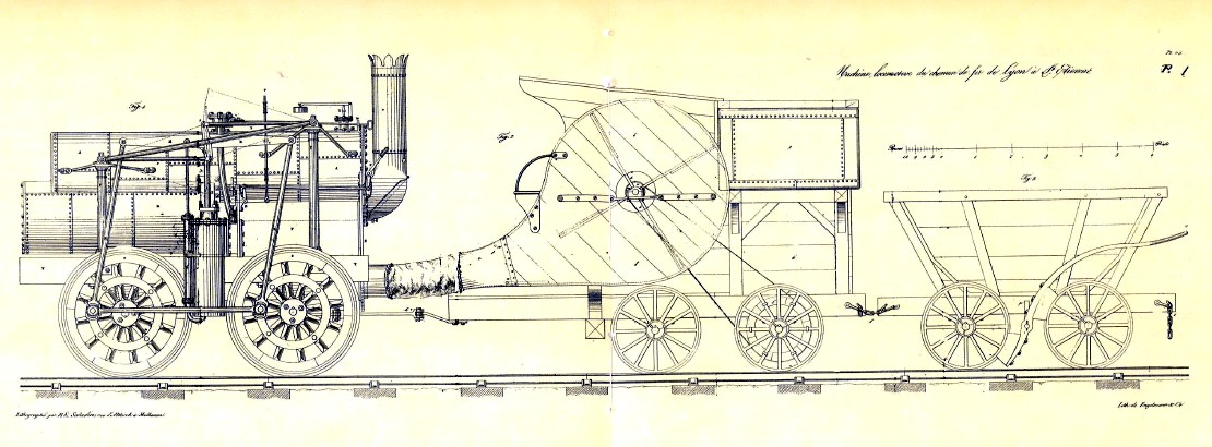 lithographie